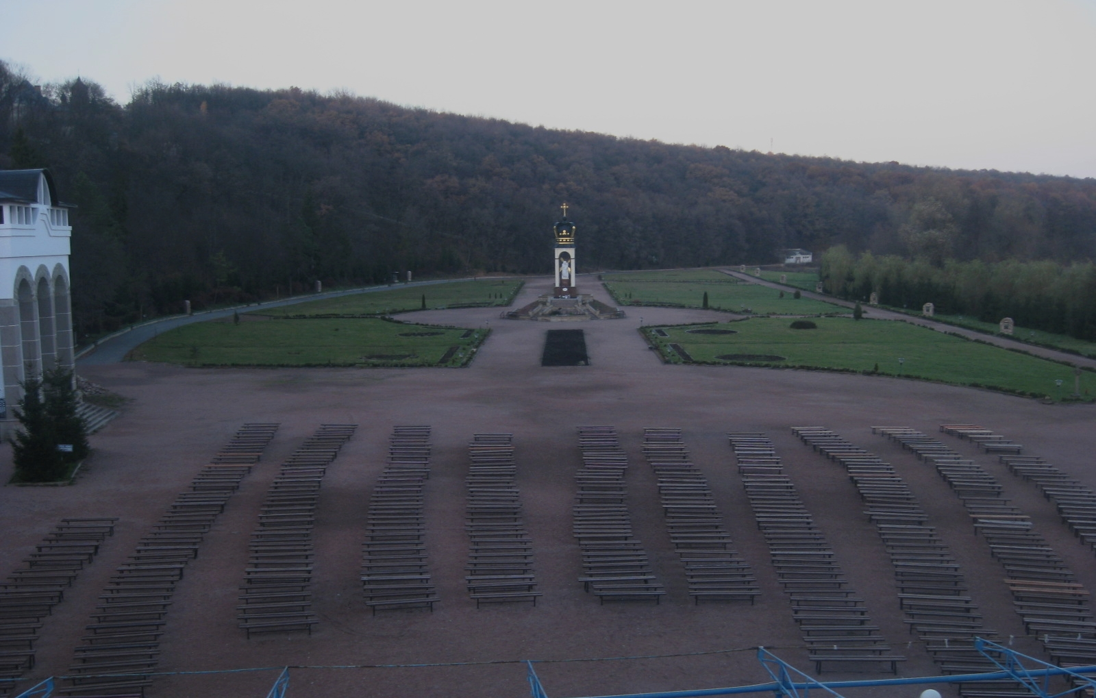 «Зарваницький», Теребовлянський район, с. Зарваниця, Бучацьке л-во, кв. 15-21, лісове урочище «Вишнівчик», заплава р. Стрипа